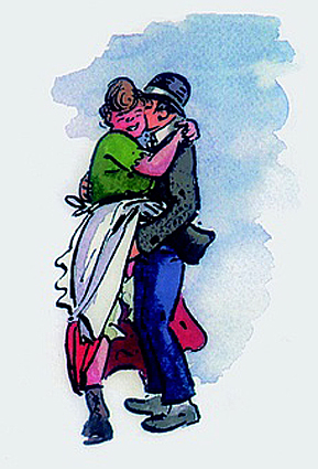 "Hurengespraeche" painting by Heinrich Zille